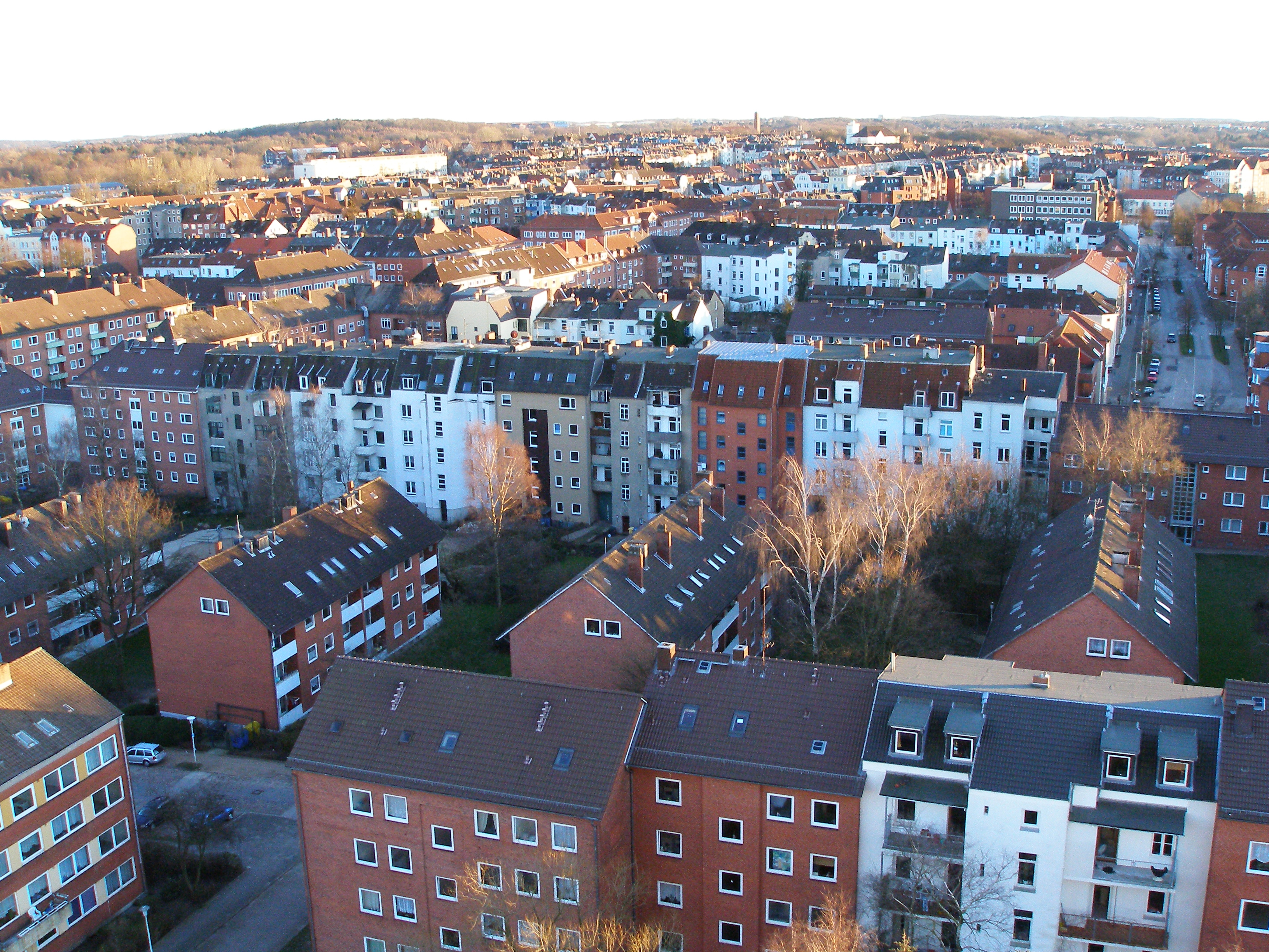 Selbst erstelltes Foto - svenne - Blick über Gaarden aus dem Hochhaus an der Werft.